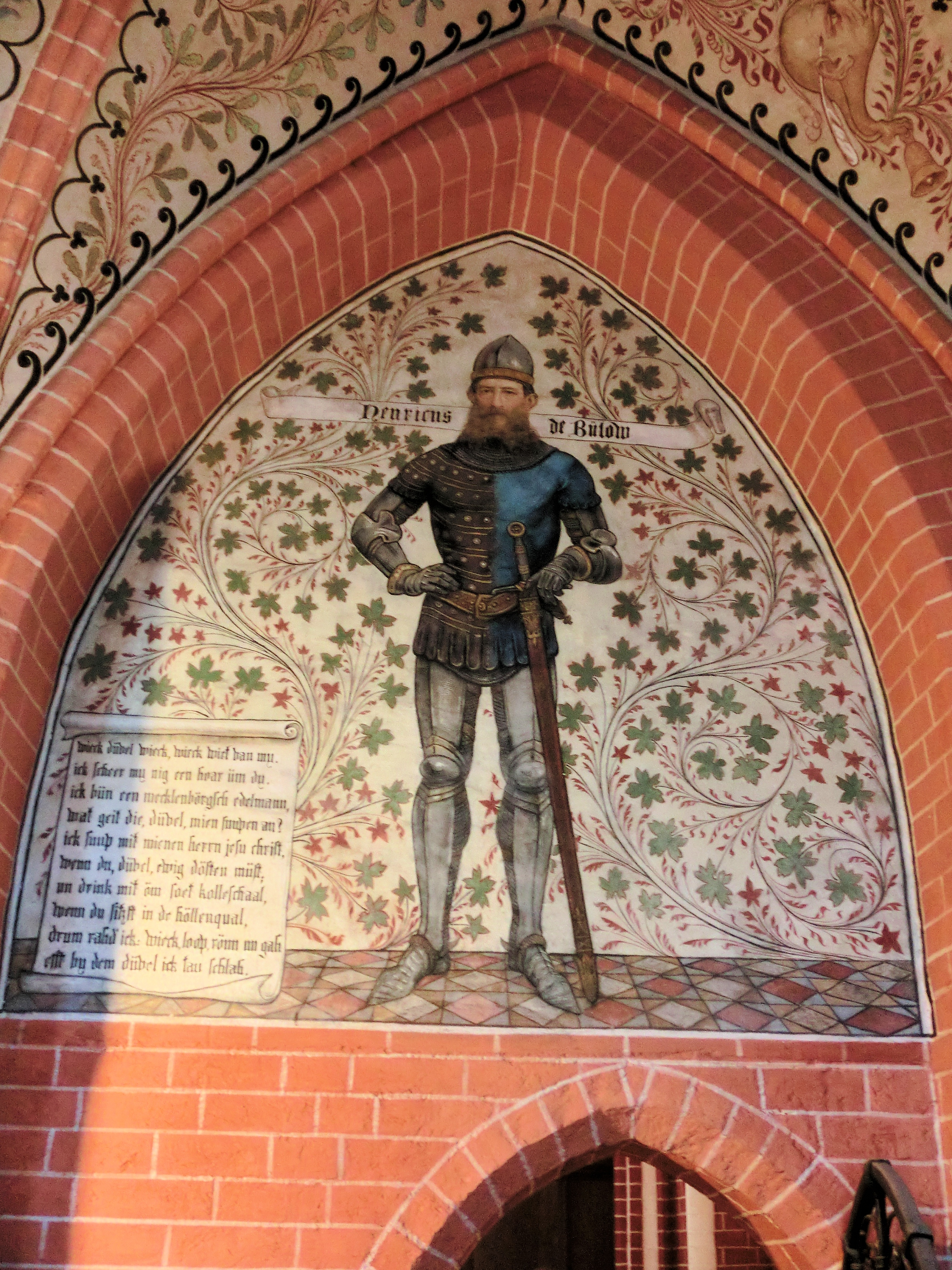 Bad Doberan Münster Fresko in der Bülow-Kapelle mit niederdeutscher Inschrift, 1877 geschaffen